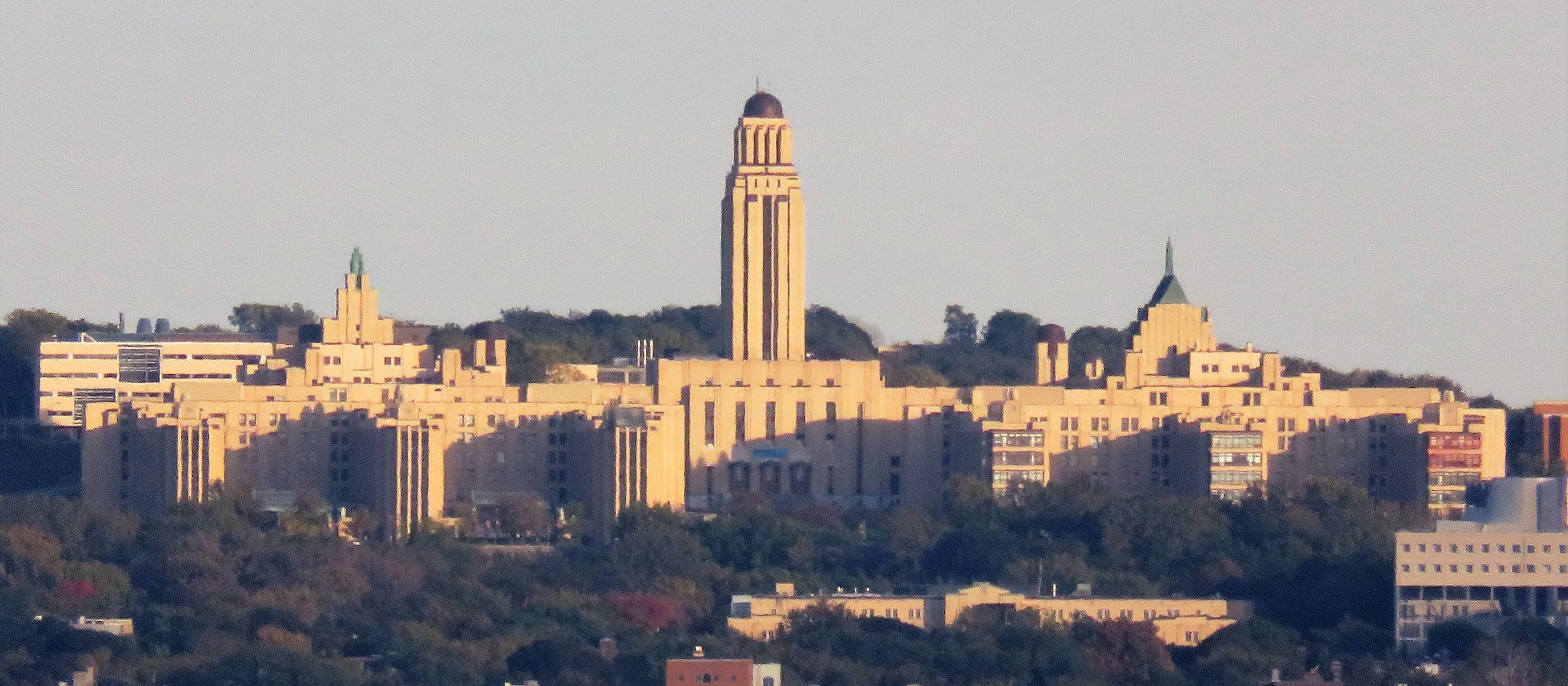 Pavillon Roger-Gaudry de l'Université de Montréal, conçu par l'architecte Ernest Cormier, Montréal, Québec.